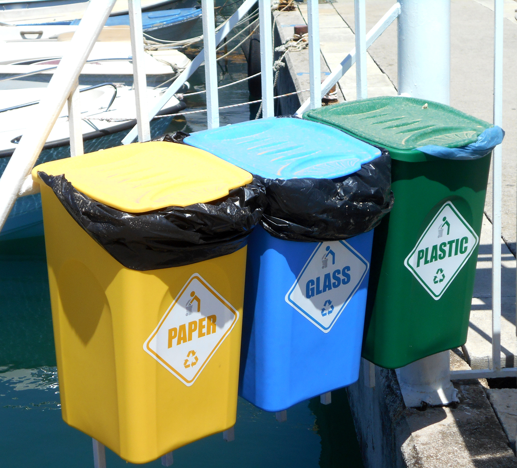 Reciklažni kontejneri za odvajanje papirnog, plastičnog i staklenog otpada u barskoj marini.